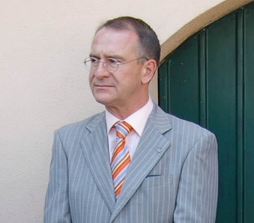 Robert Eiter anlässlich der Verlegung von Stolpersteinen in Wels